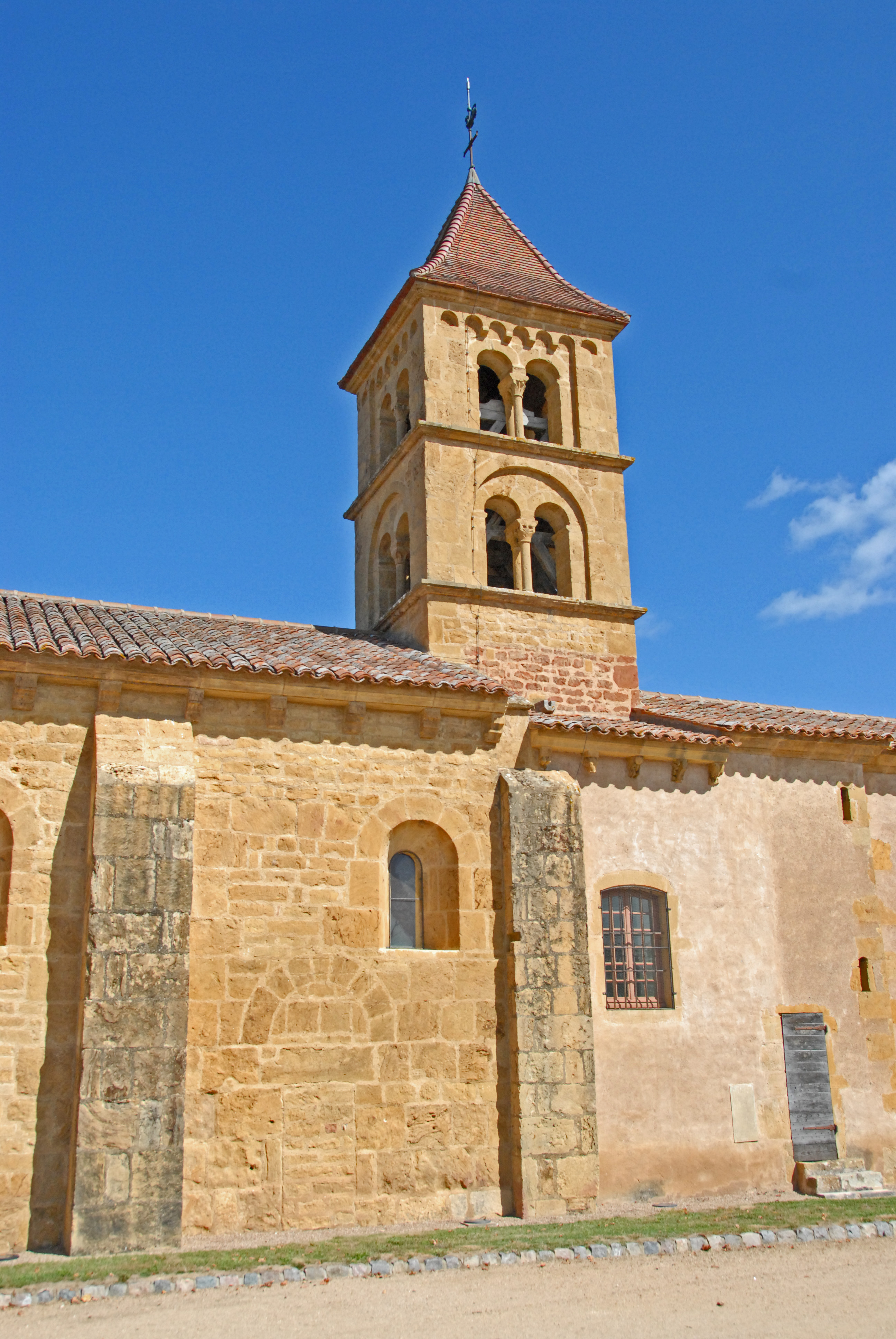 Sts-Pierre-et-Paul de Montceaux l'Étoile, Vorjoch mit Turm